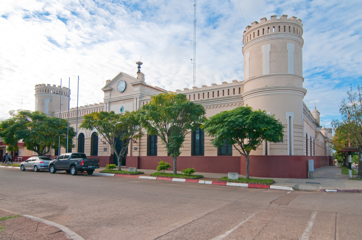 Jefatura de Policía. Ubicada en el departamento de Artigas